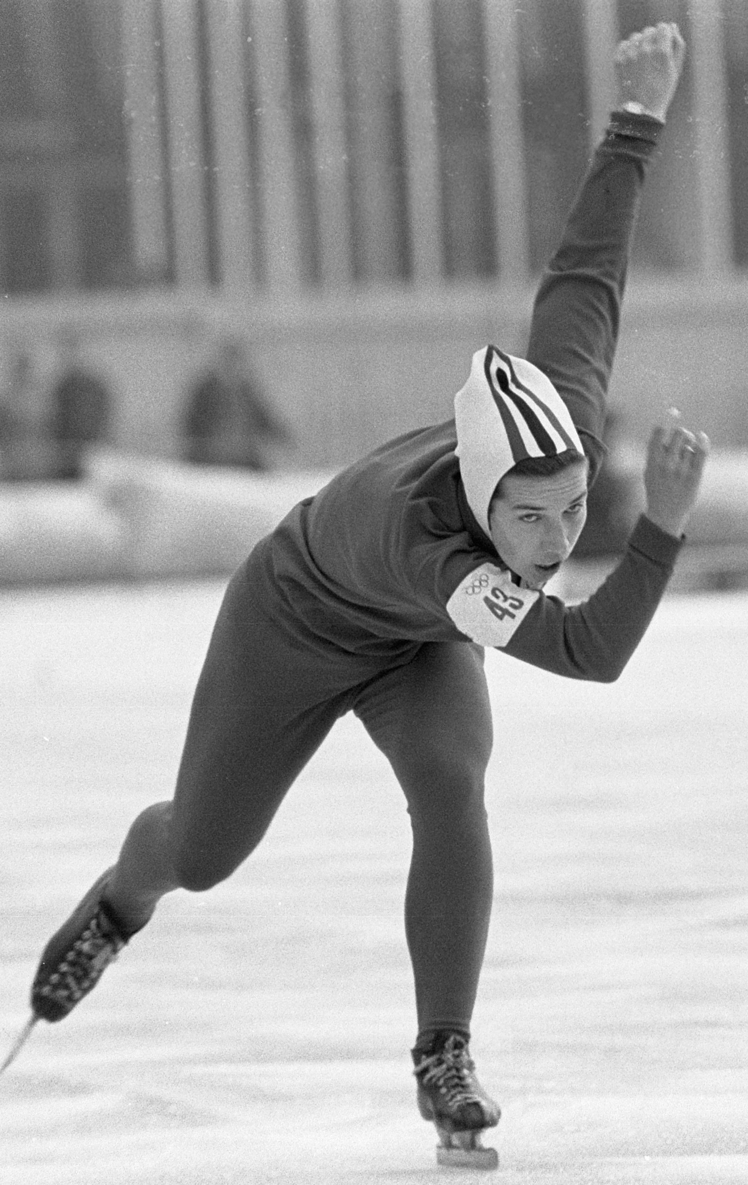 Lāsma Kauniste at the 1968 Olympics